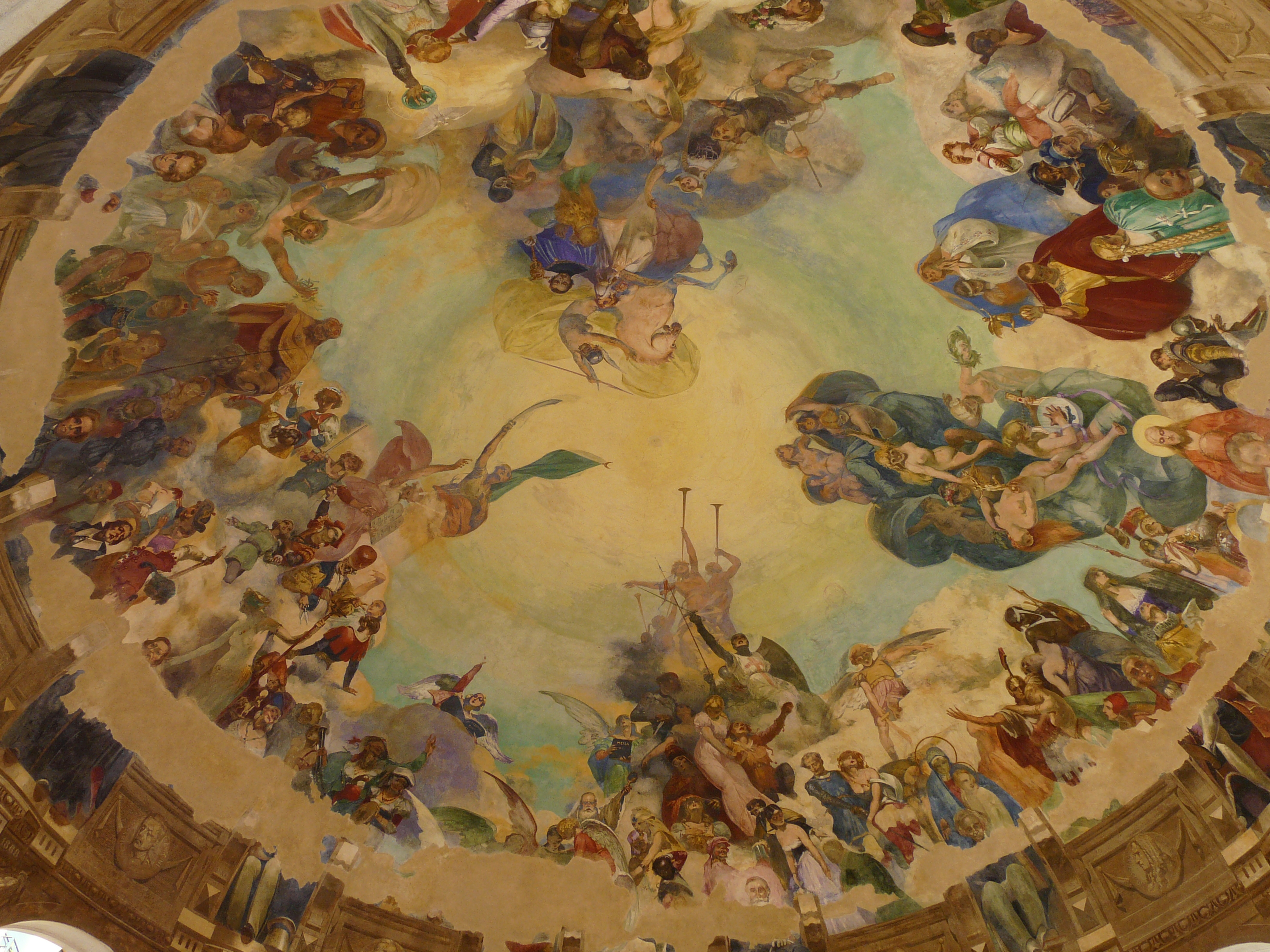 Cupola interna del chiosco della musica, Rapallo, Liguria, Italia